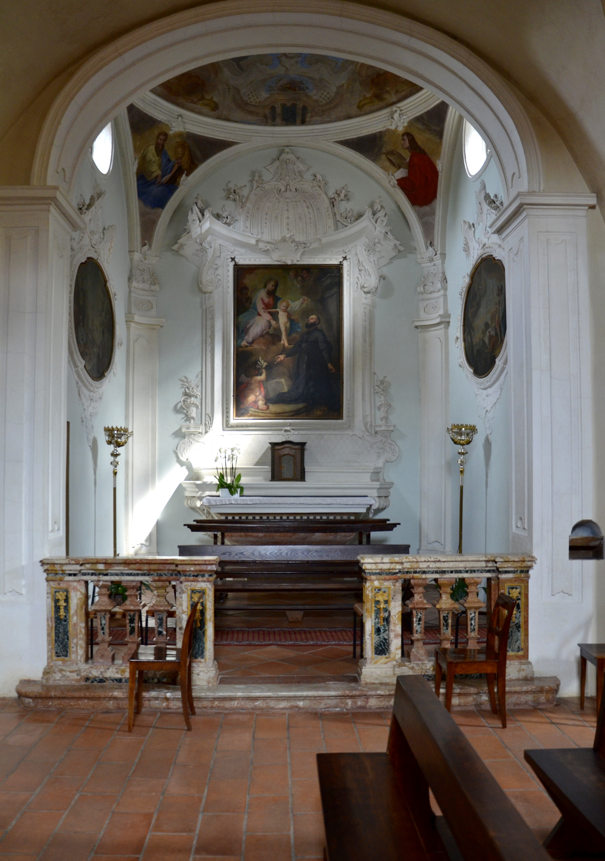 Chiesa parrocchiale di Santa Maria Assunta